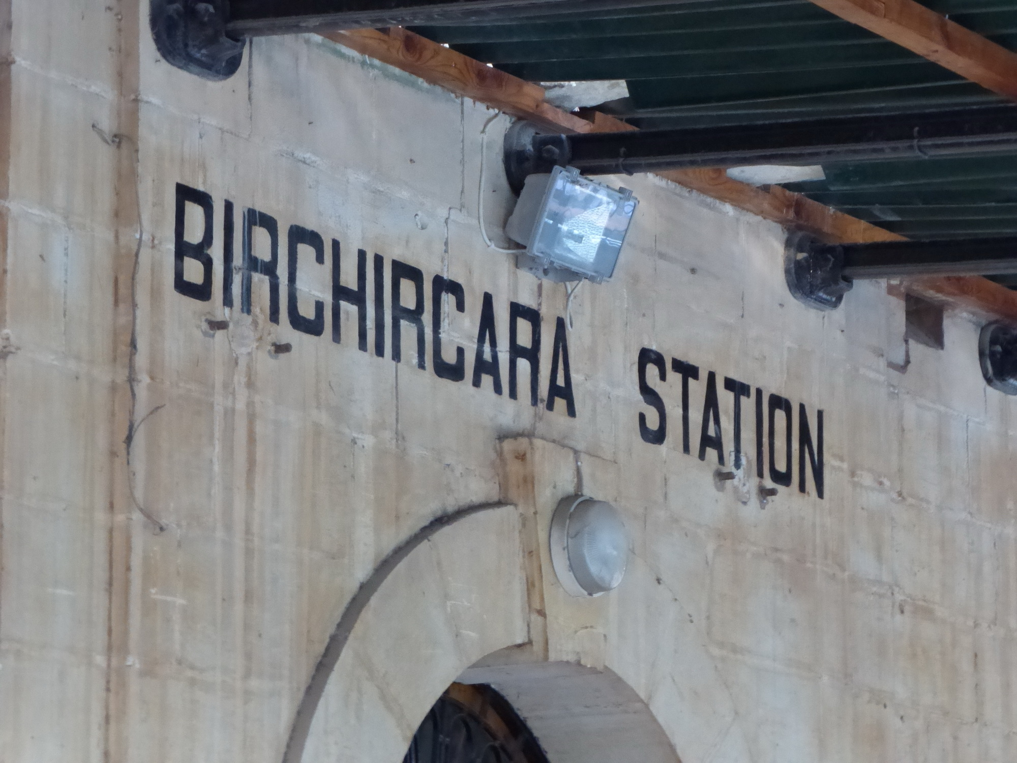 Ehemaliger Bahnhof von Birchircara (Malta)